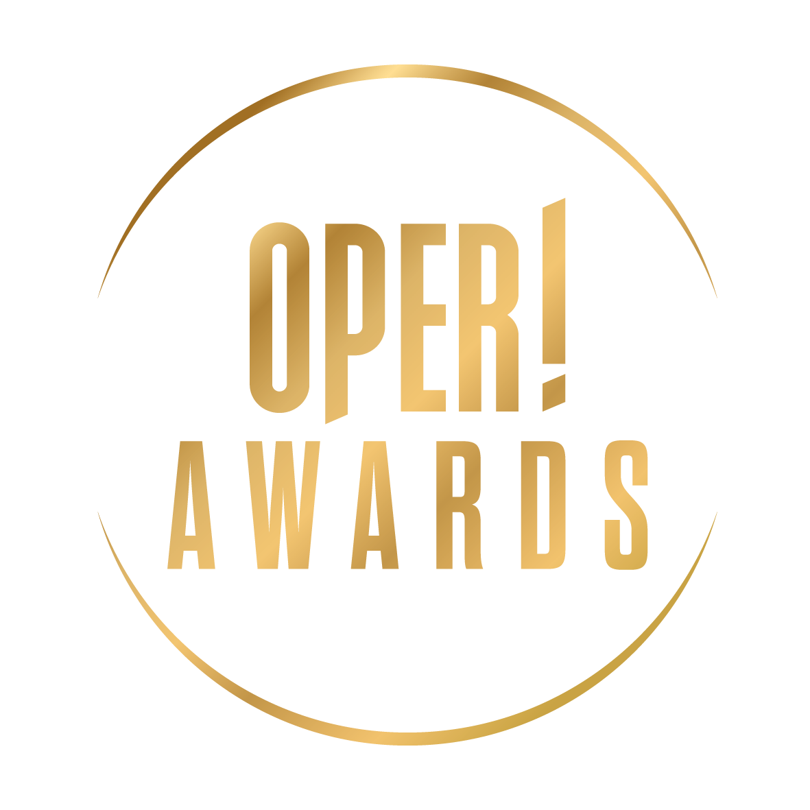 Logo der Veranstaltung OPER! AWARDS, ausgerichtet von der Fachzeitschrift OPER!